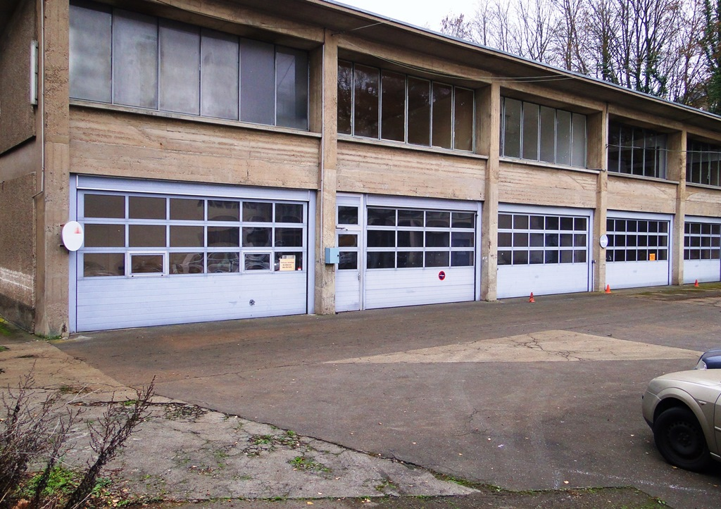 Luxembourg-Verlorenkost, bâtiments de l'ancienne Gendarmerie, aujourd'hui Police Grand-Ducale